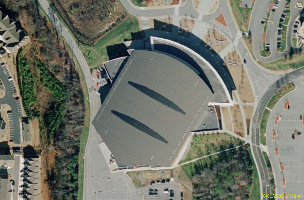 Image satellite de la Arena at Gwinnett Center.